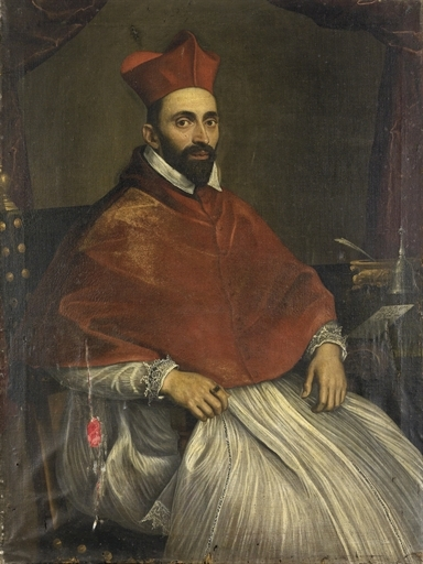 Portrait of Cardinale Antonio Michele Ghislieri detto Alessandrino (1504-1572)